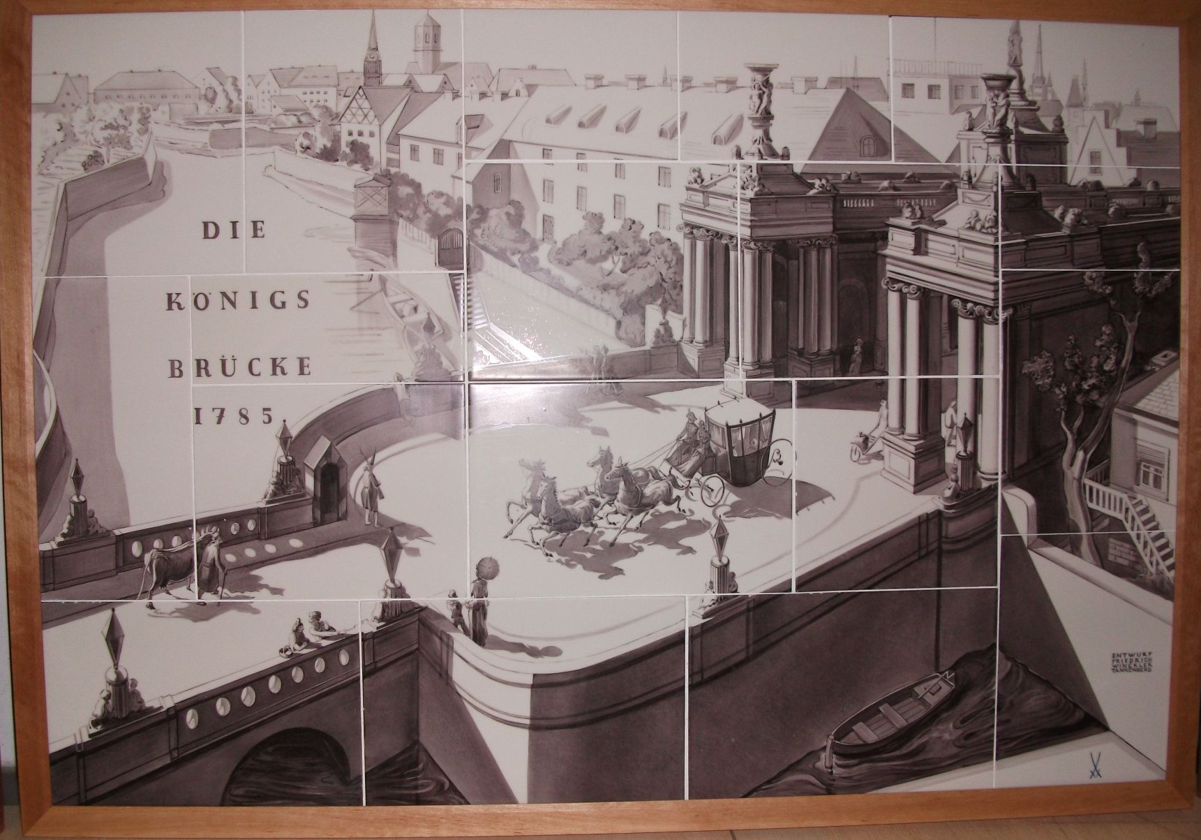 Fliesenbild Alexanderplatz